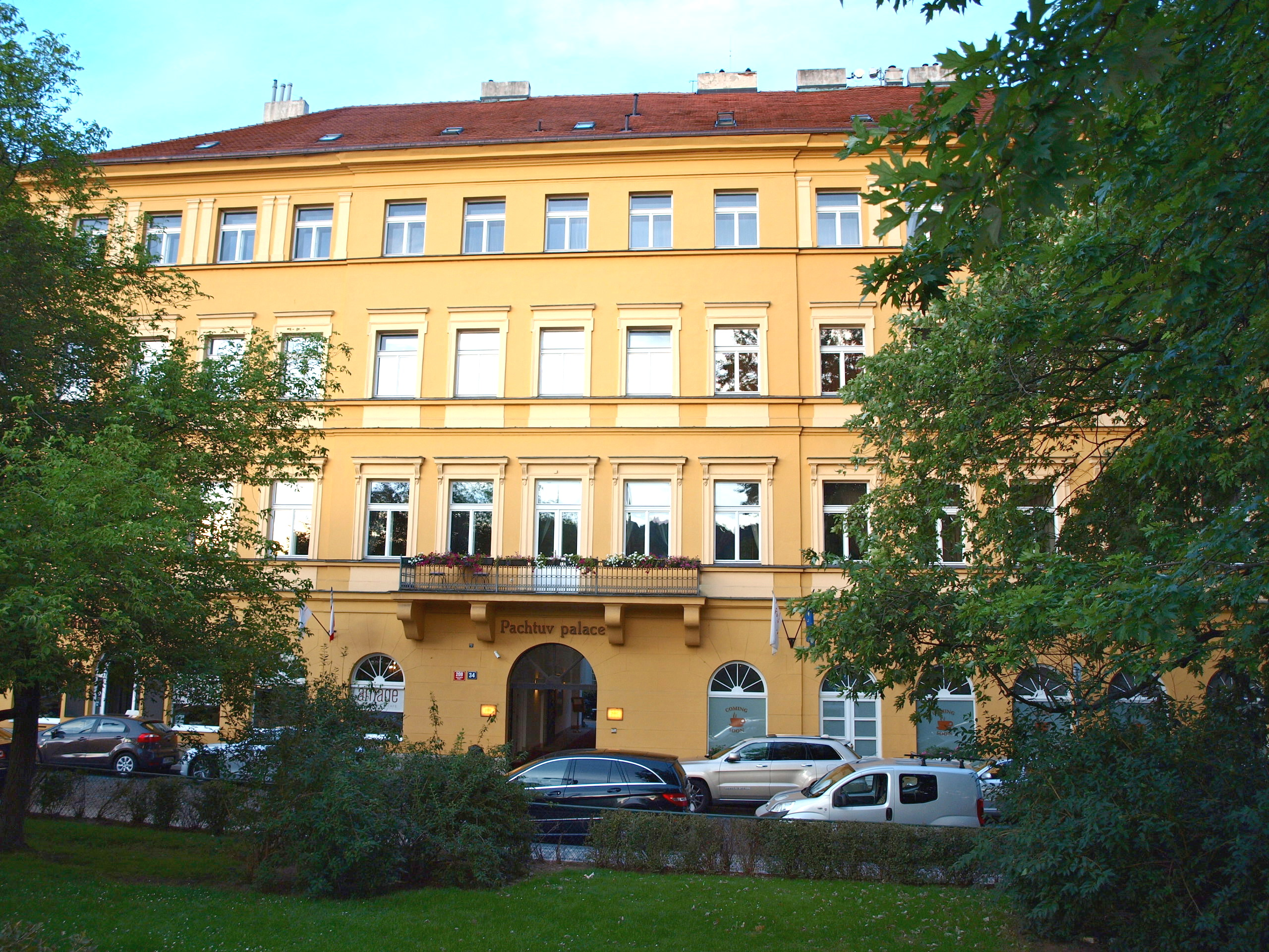 Nový Pachtův palác